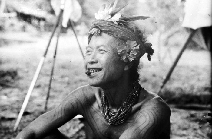 Repronegatief. Een man met tatoeages te Sikakap, Mentawai-eilanden